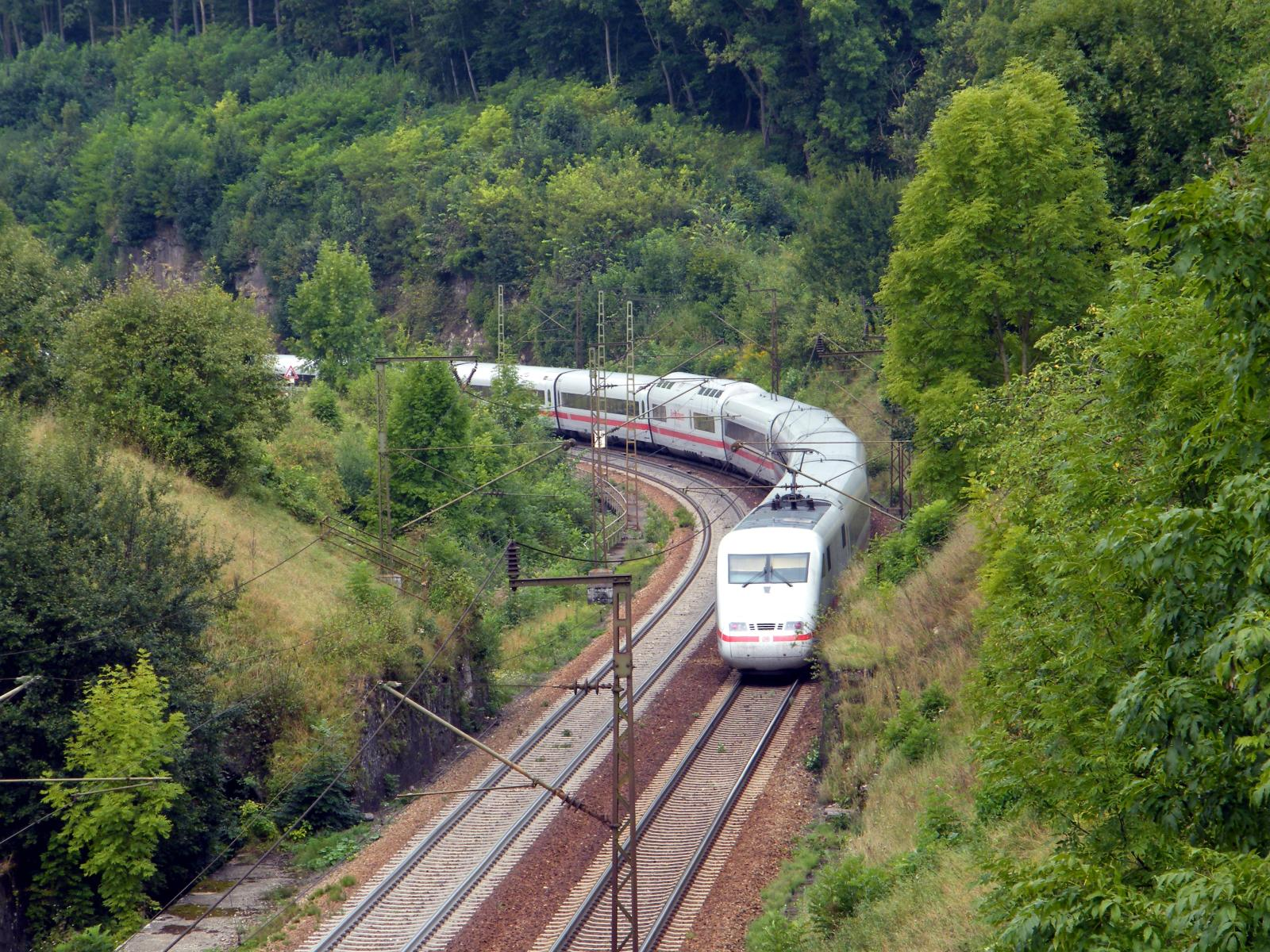 Der ICE 598 von München über Stuttgart und Frankfurt nach Berlin Ostbahnhof fährt von der Schwäbischen Alb nach "unten" über die Geislinger Steige